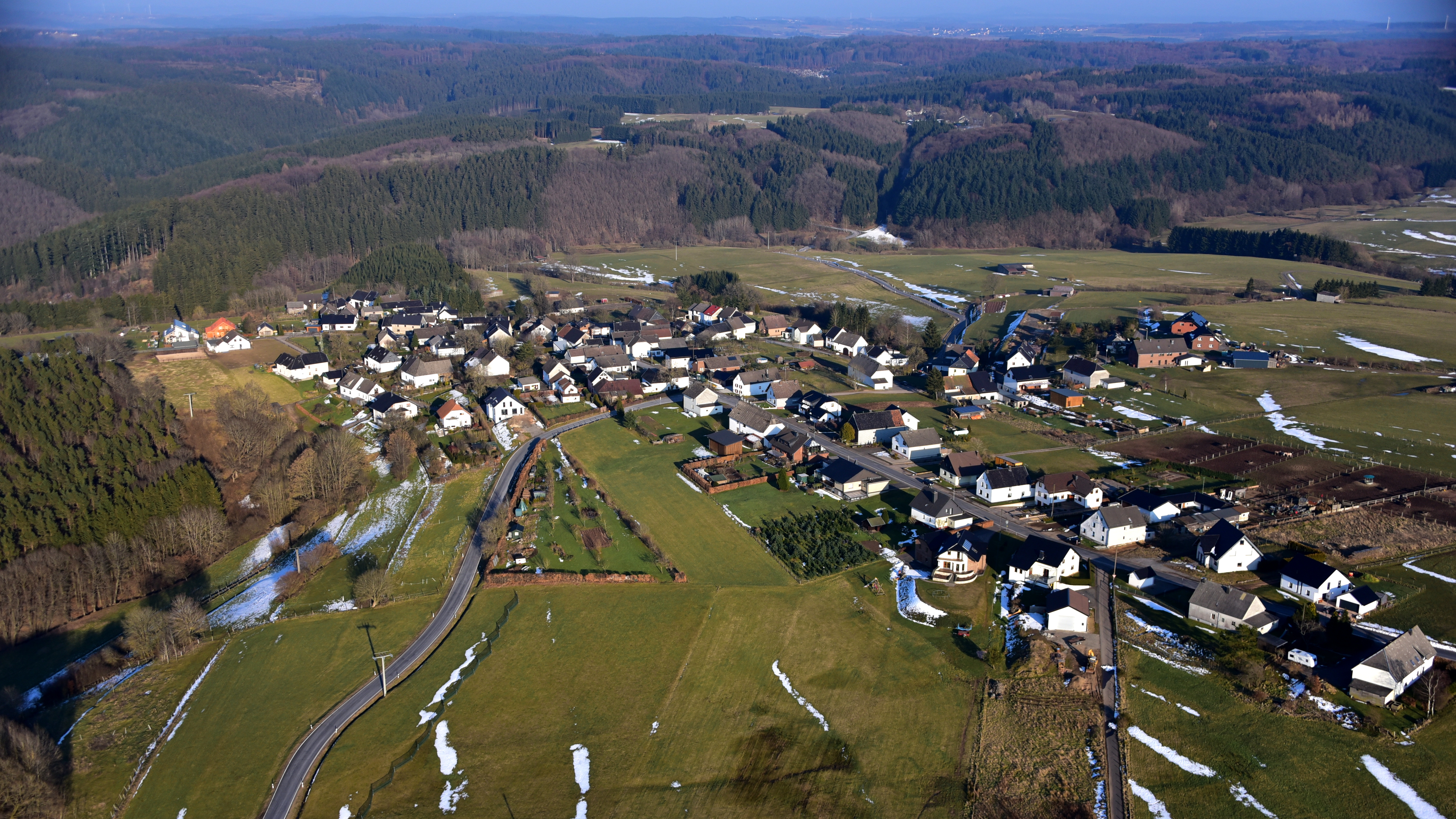 Hecken (Hellenthal), Luftaufnahme (2016)